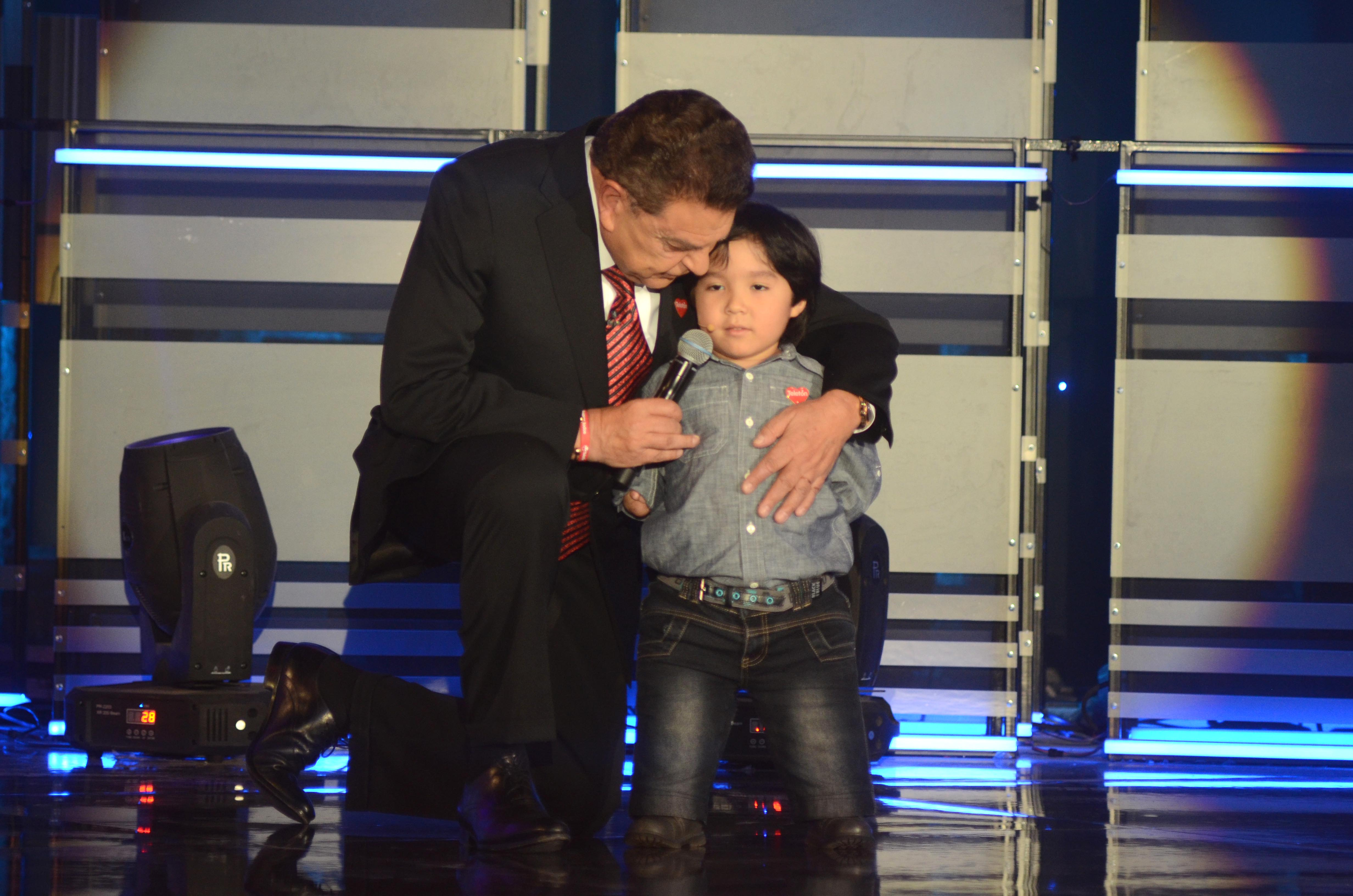 Ministro Elizalde asiste a la Ceremonia Inaugural de la Teletón